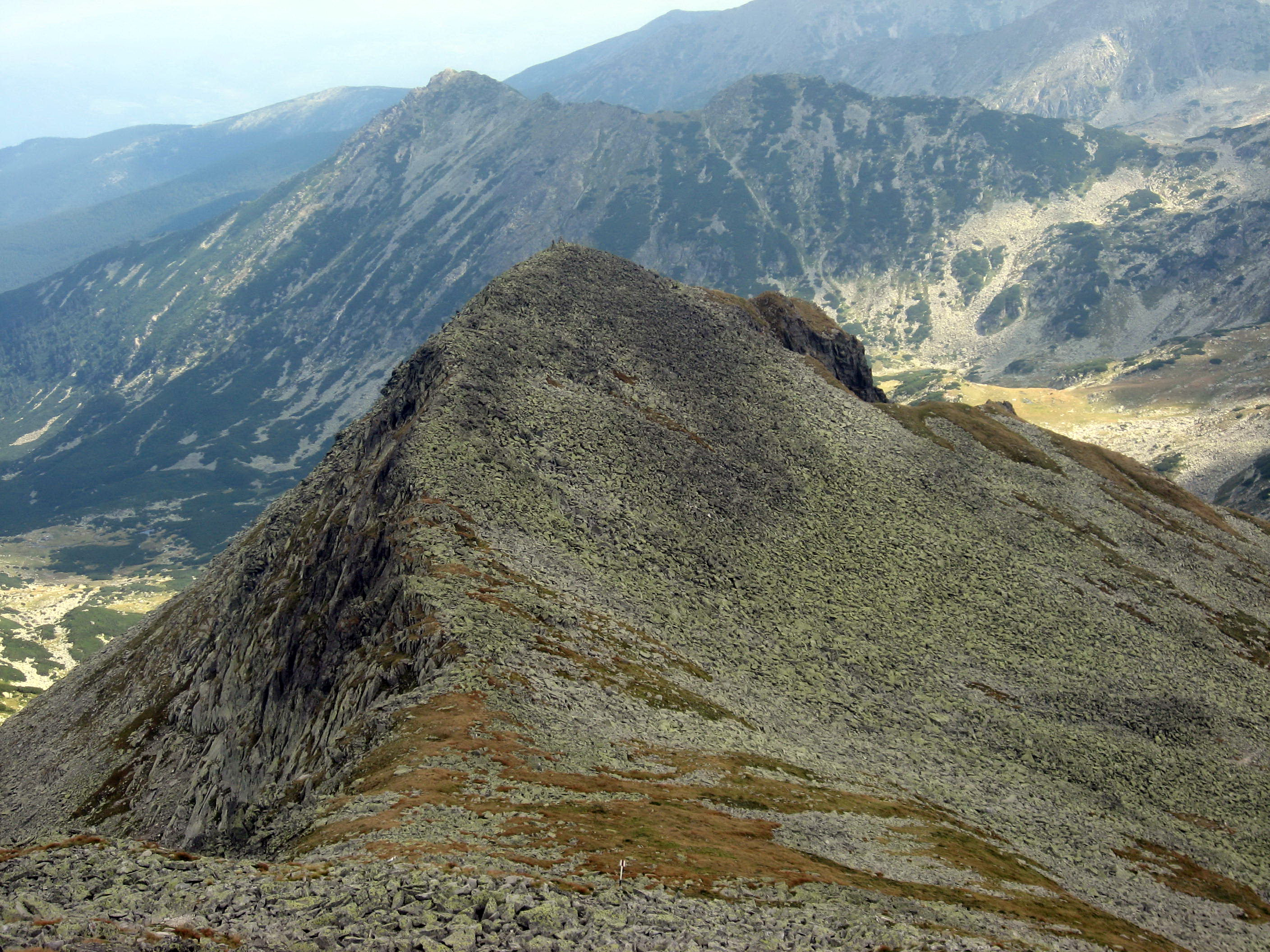 Bucura II.